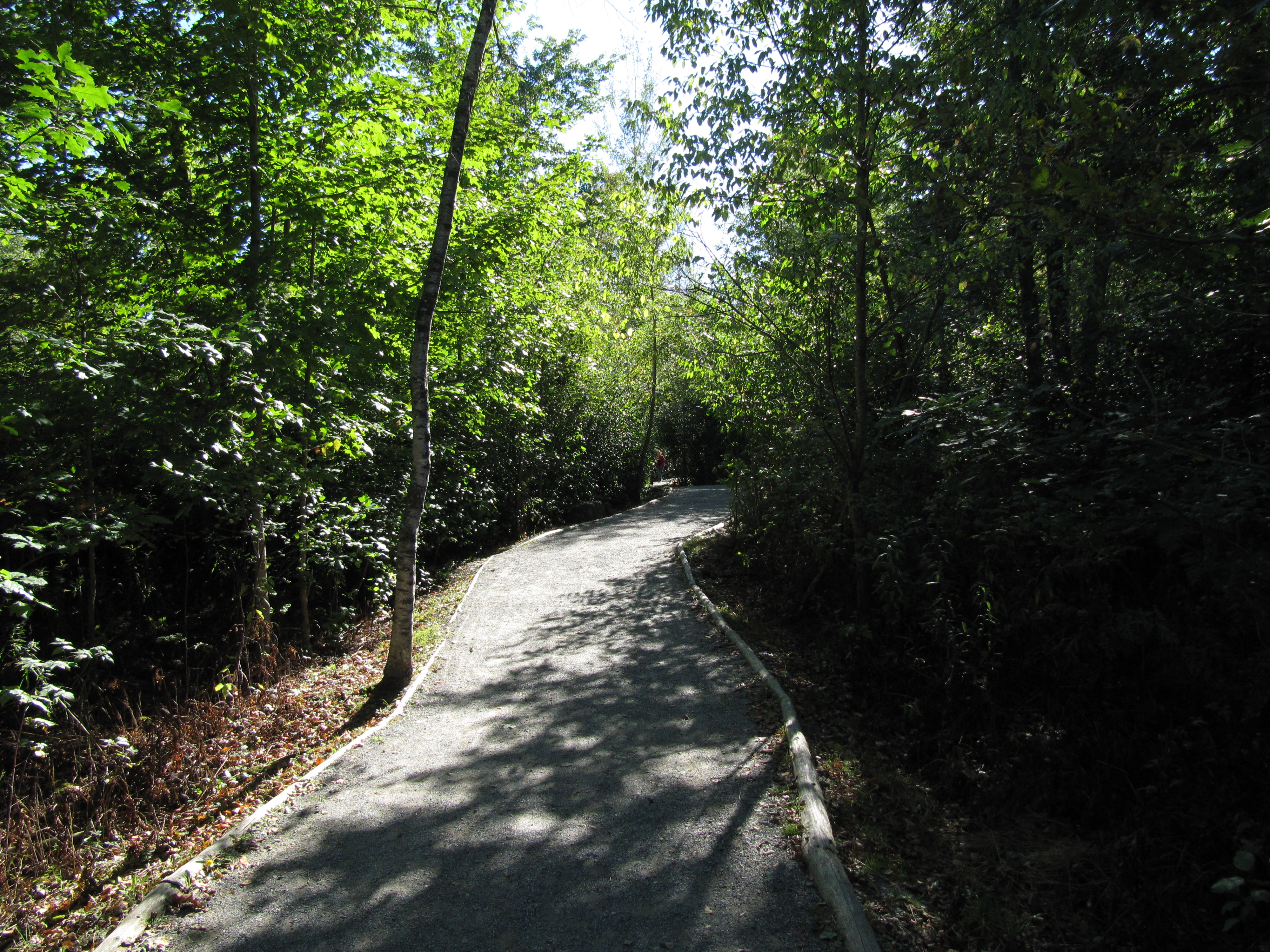 Photo prise au Centre d'Interprétation de la nature du lac Boivin de Granby (Québec). Sentier de la Prucheraie.